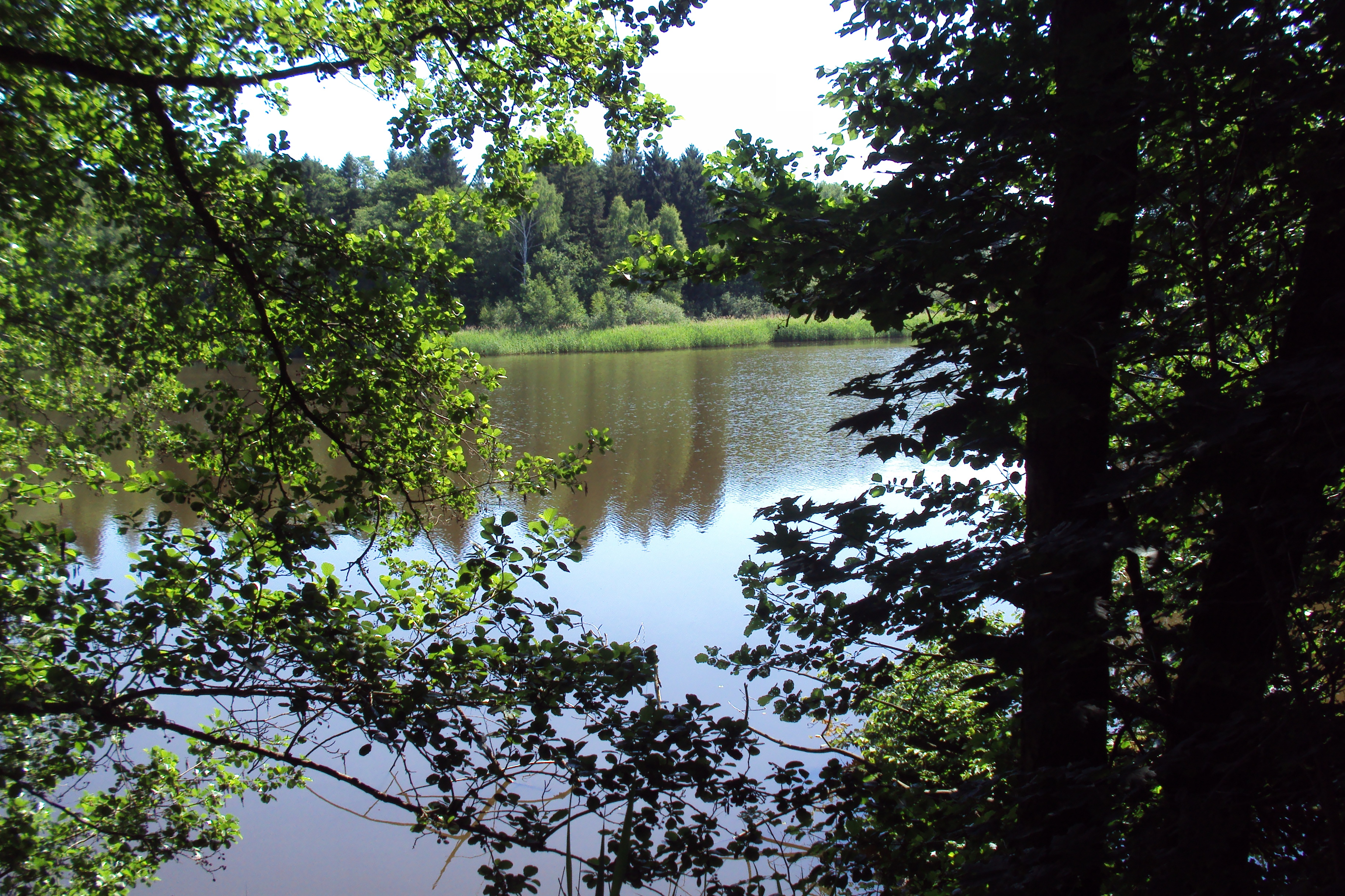 Janovský rybník je na konci Janova při výpadovce na Chotovice